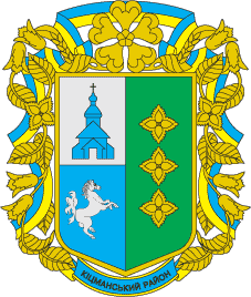 Затверджений 22 грудня 2001р. рiшенням №№108-22/01 XXII сесії районної ради XXIII скликання. Щит розтятий і напівперетятий справа. На першій срібній частині - лазурова церква. На другій лазуровій - срібний здиблений кінь. На третій зеленій - три золотих букових горішка в стовп. Щит оповитий золотим вінком із букових гілок та колосся, оповитим синьо-жовтою стрічкою, та увінчаний золотою квіткою рододендрону східно-карпатського червоного (рути). Мотивом герба служить буковинська народна пісня: "Буковина ти зелена на три части розділена..." Срібло символізує непрочитані (невідкриті) сторінки багатої на події історії краю, лазуровий - водні ресурси, зелений - поля і лісові багатства Кіцманщини. Церква - Успенський Свято-Вознесенській храм, збудований в Лужанах 1453р., який є найстарішим на Буковині. Кінь - символ свободи і працелюбності. Букові горішки символізують ліси краю. Квітка - прототип всесвітньо відомої пісні Володимира Івасюка "Червона рута". Автор - В.Гнатюк. Комп'ютерна графіка - В.М.Напиткін.